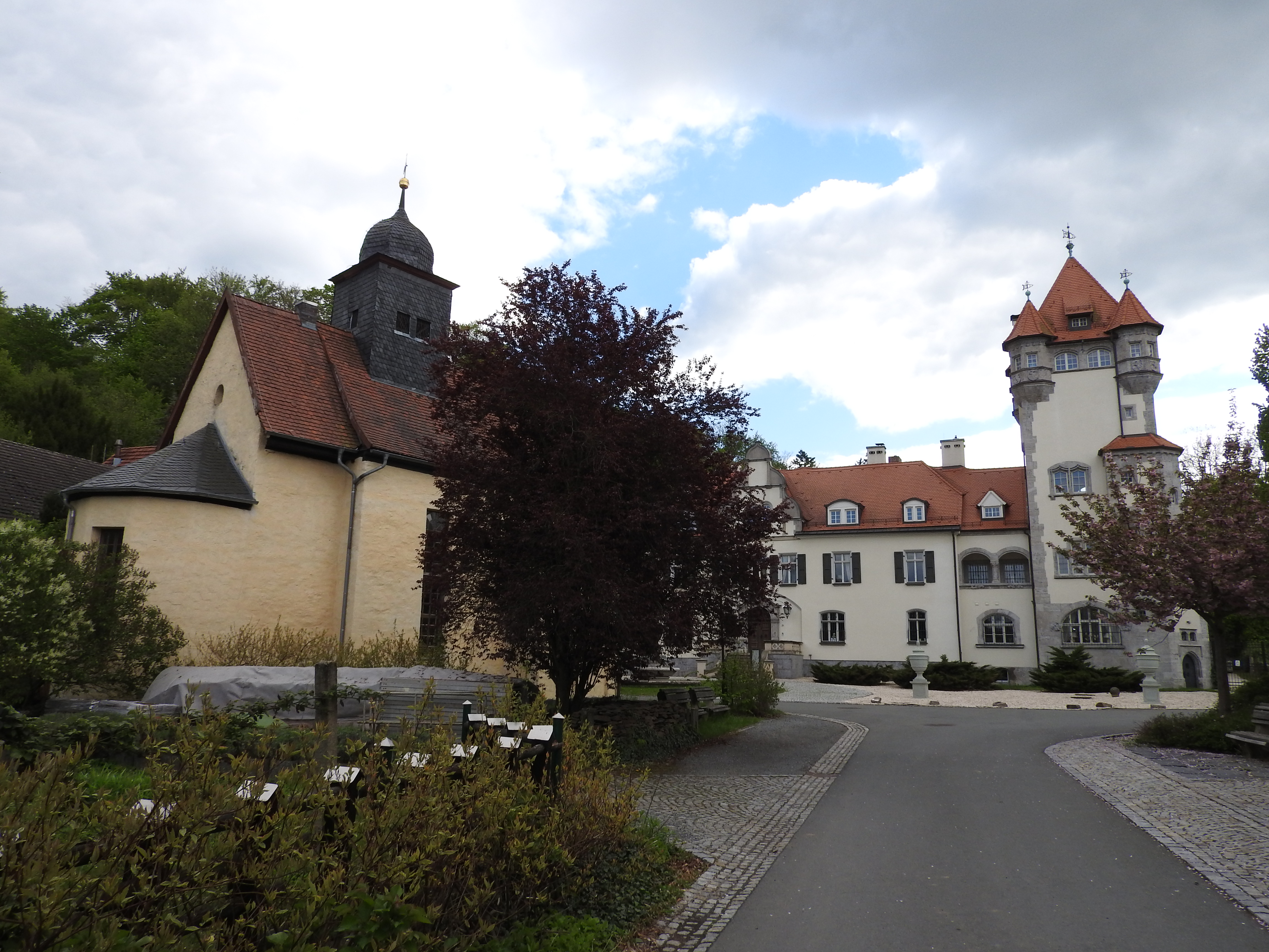 Kospoda, Thüringen